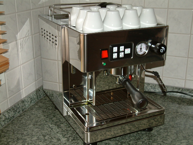 C.M.A. San Marino CKXE